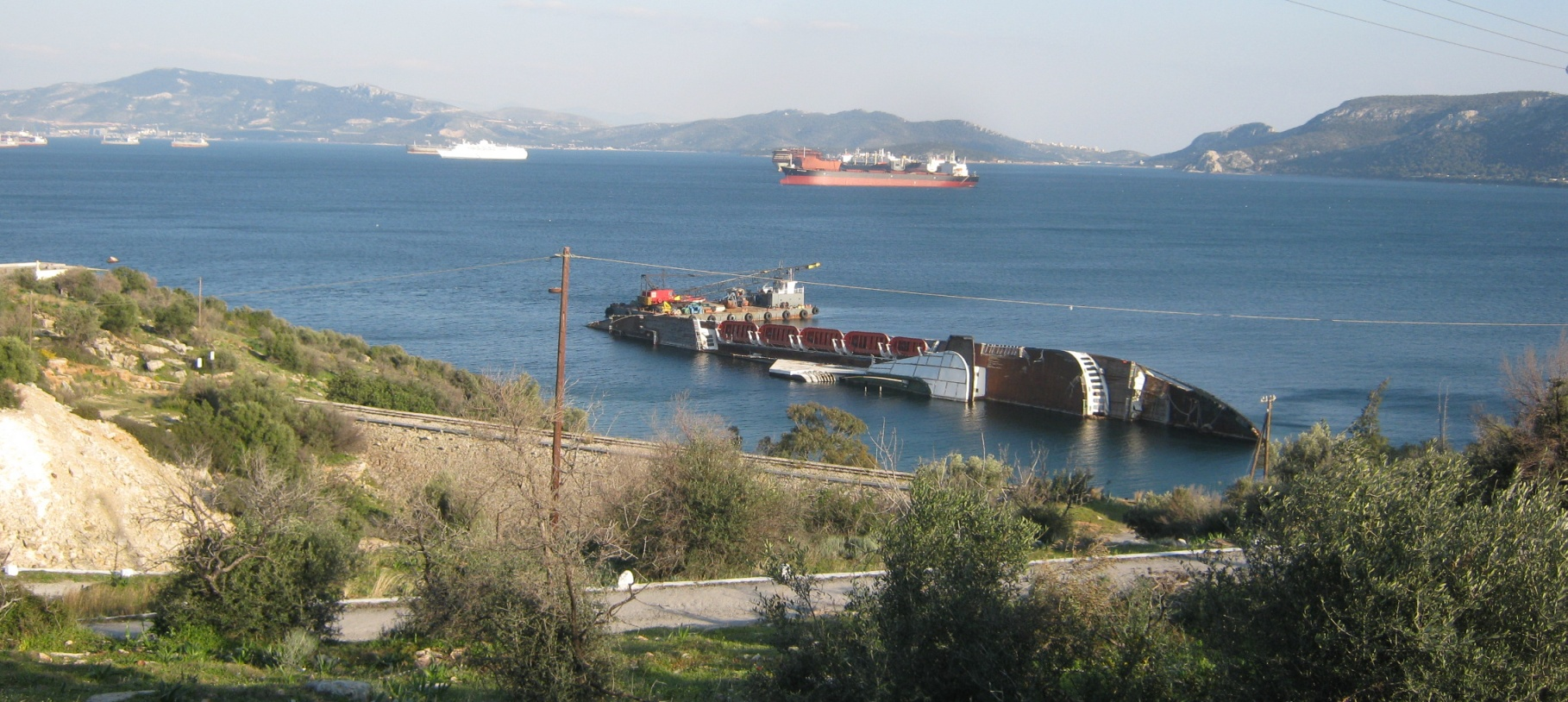 sunken ship